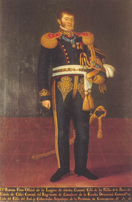 Coronel General Ramón Freire